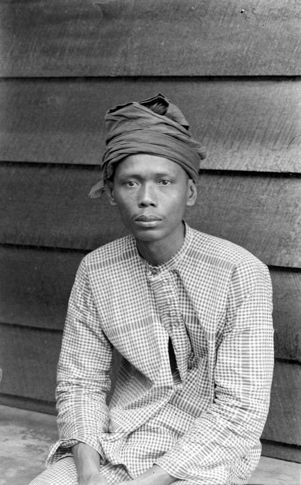 Negatief. Portret van een communist, genomen na de communistische rellen op Sumatra van 1927